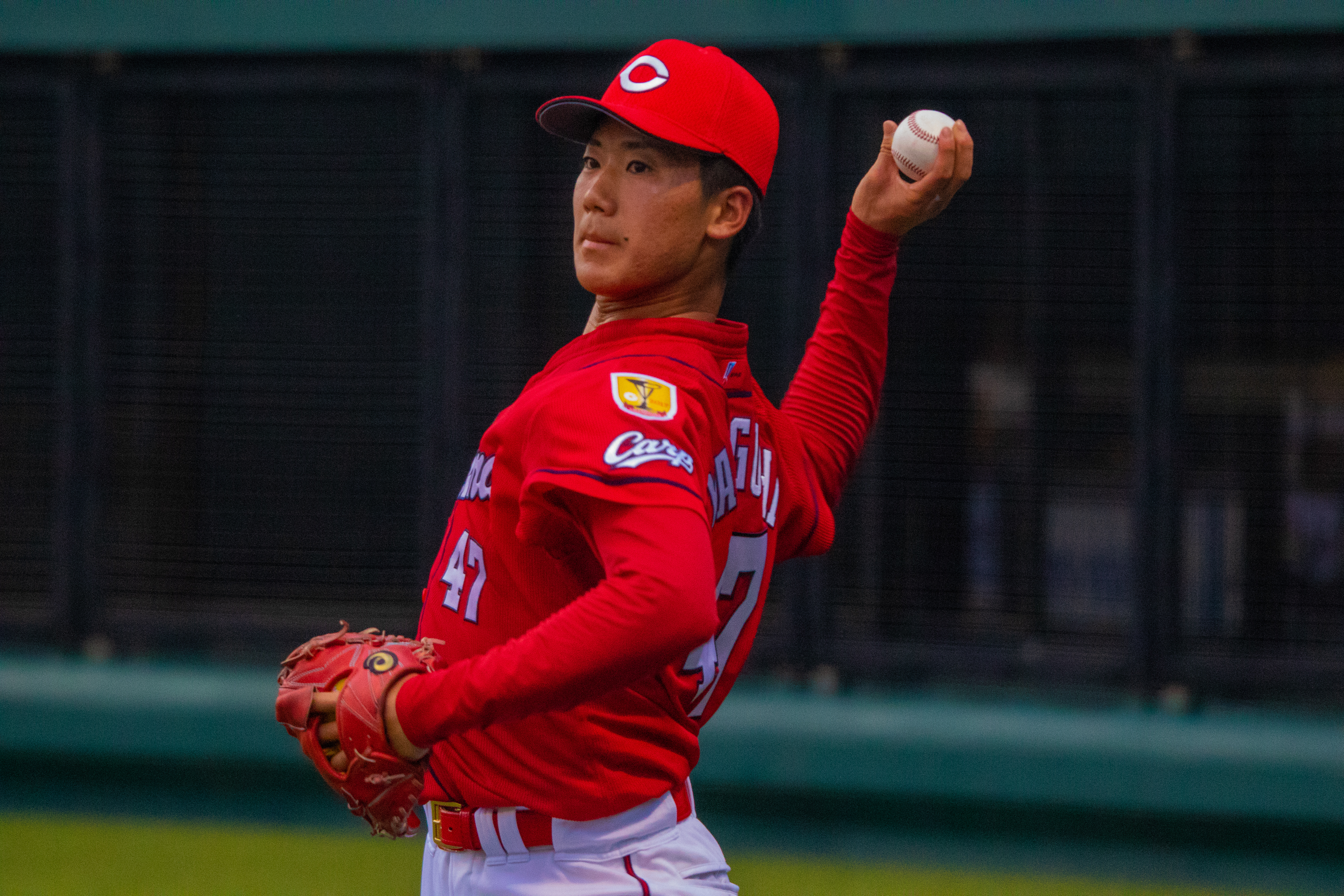 2018/8/10 タマホームスタジアム筑後